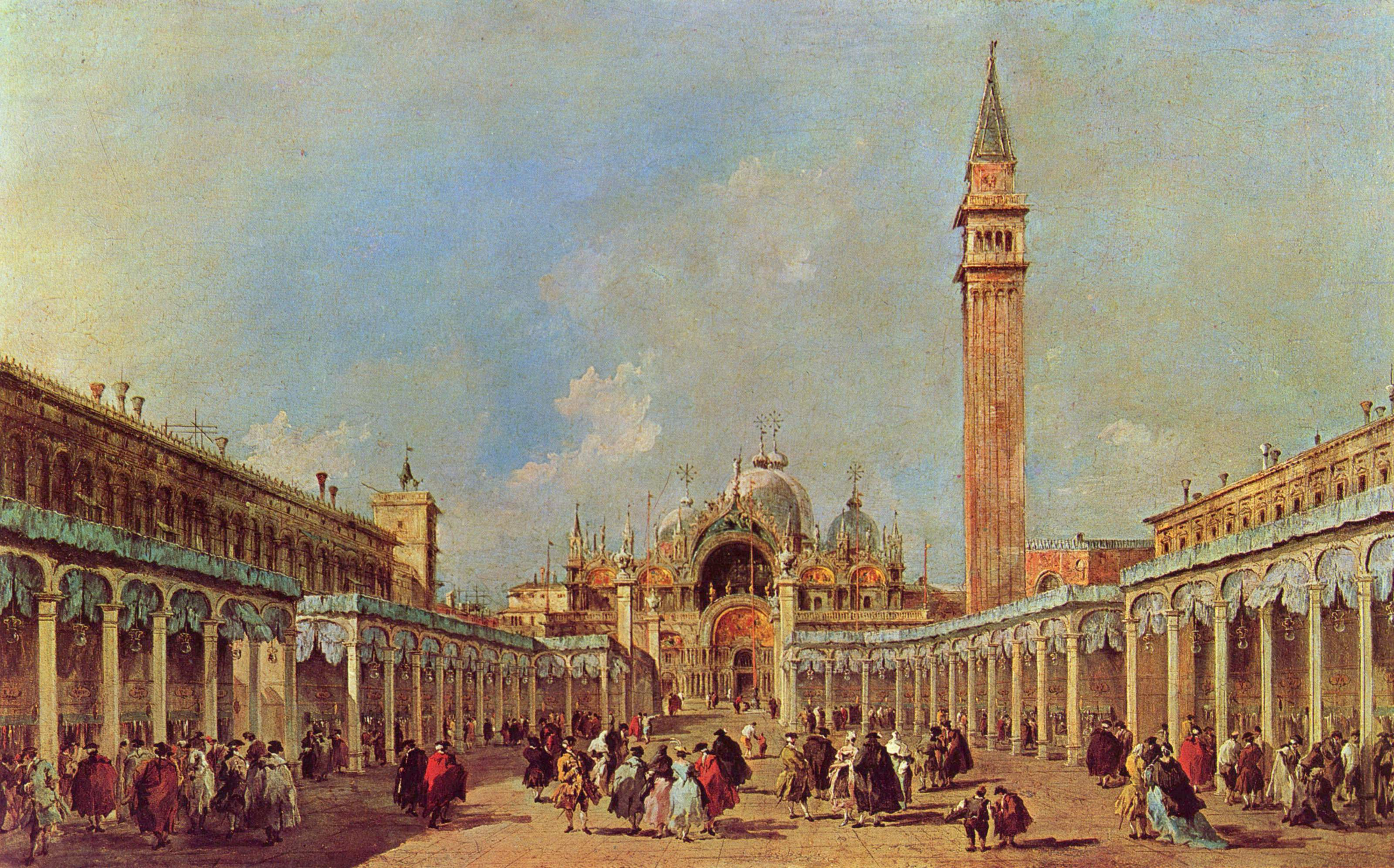 Vi si osservano padiglioni in legno provvisori, costruiti per l'annuale "fiera della Sensa" (la festa dell'Ascensione).